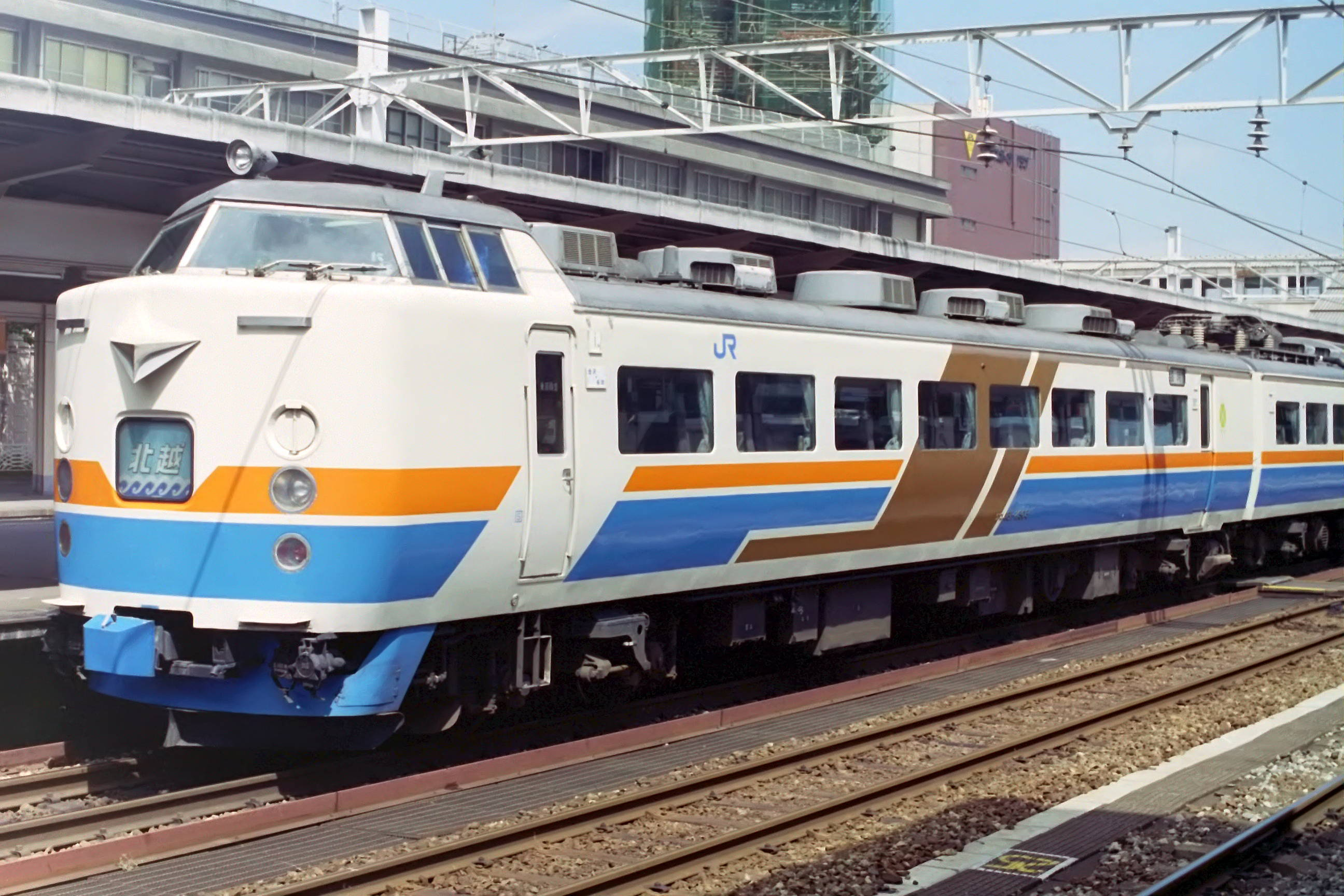 クロ481 2303